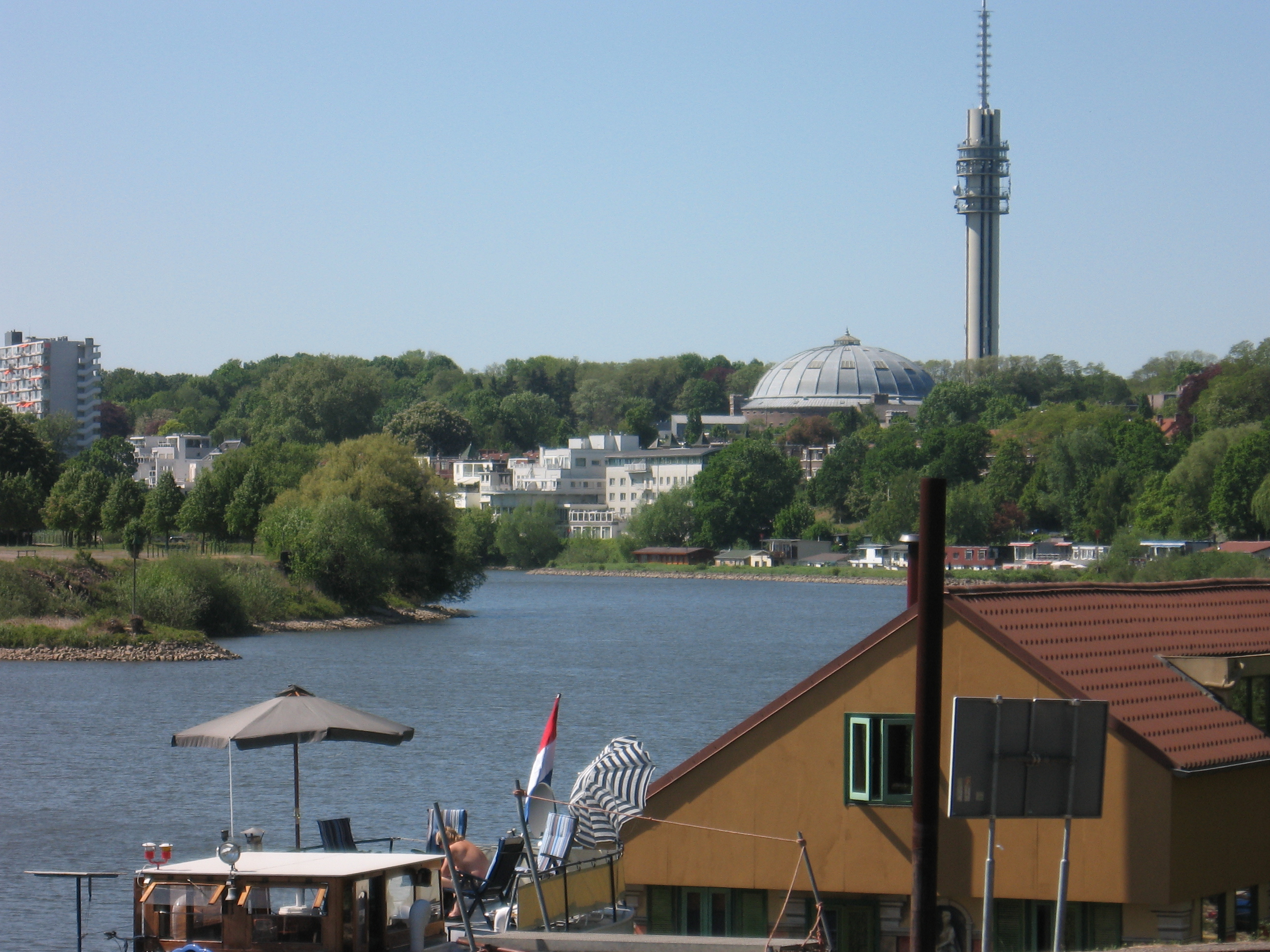 Rijn met Koepelgevangenis op achtergrond.